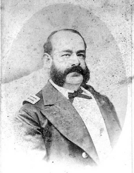 Miguel Grau Seminario (*Piura, Perú, 27 de julio de 1834 - † Punta Angamos, 8 de octubre de 1879) fue un marino peruano, almirante de la Marina de Guerra del Perú y destacado héroe peruano.